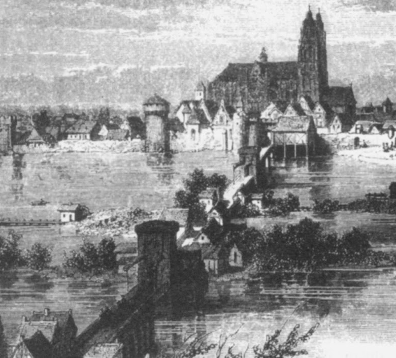 Gravure médiévale vers 1699 de la ville de Tours coté Nord. Au premier plan la Loire. Au fond, on aperçoit de façon centrale le château de Tours du XIII° siècle et la Cathédrale Saint-Gatien. Au premier plan, le pont d'Eudes du XI° siècle